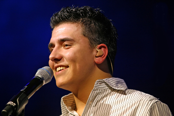 Dutch singer Jan Smit.